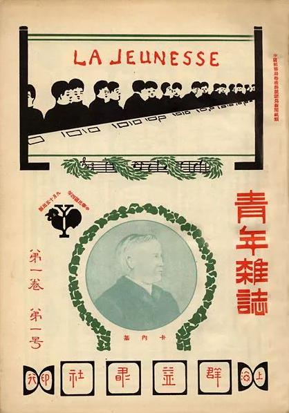 《新青年》的前身《青年杂志》，用于新文化运动编辑